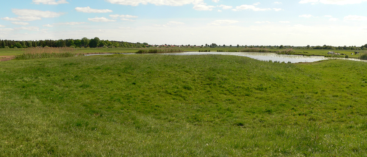 Uhlenburg Panorama